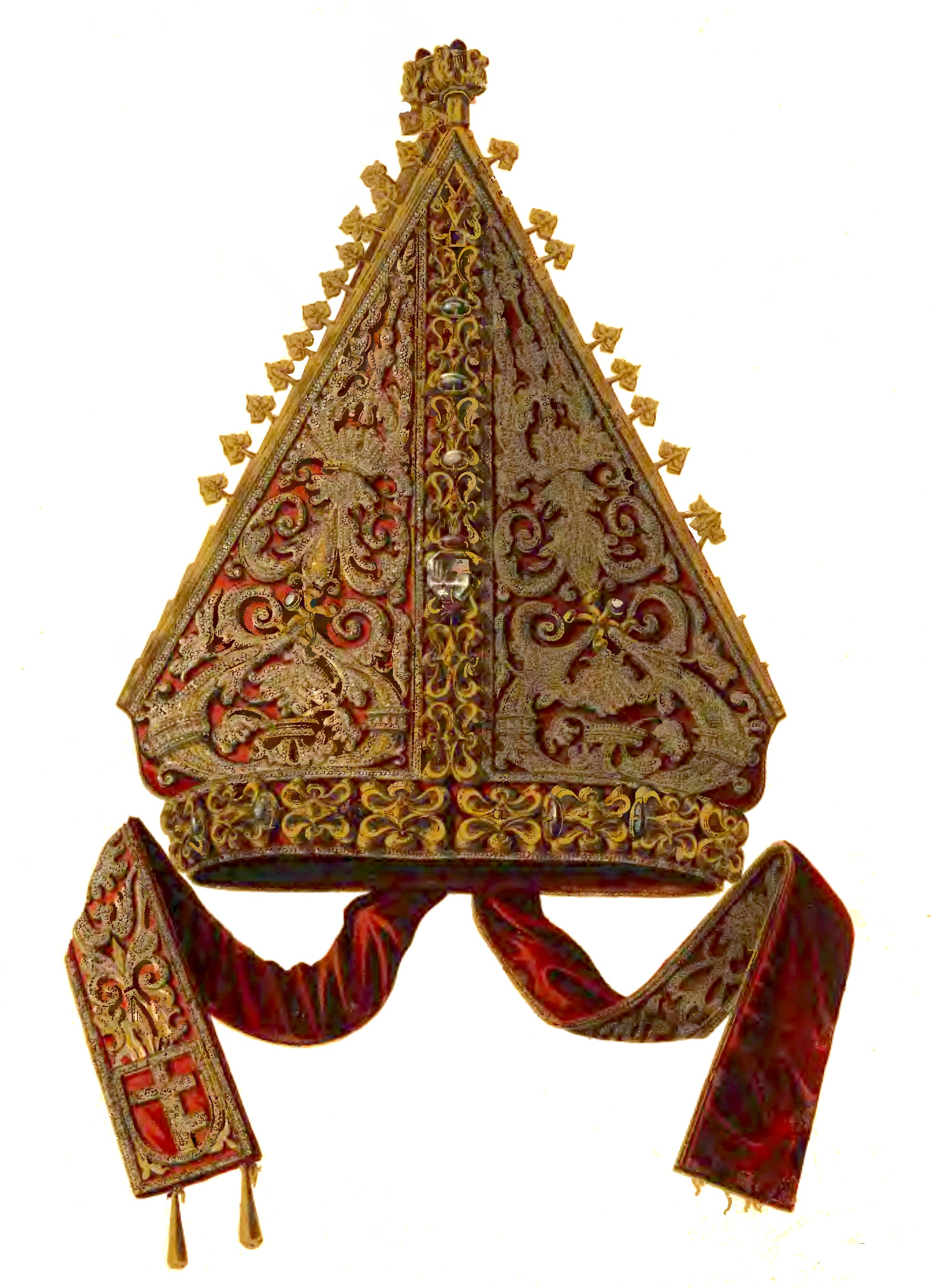 Infula of Tomasz Strzępiński bishop of Kraków from XV century